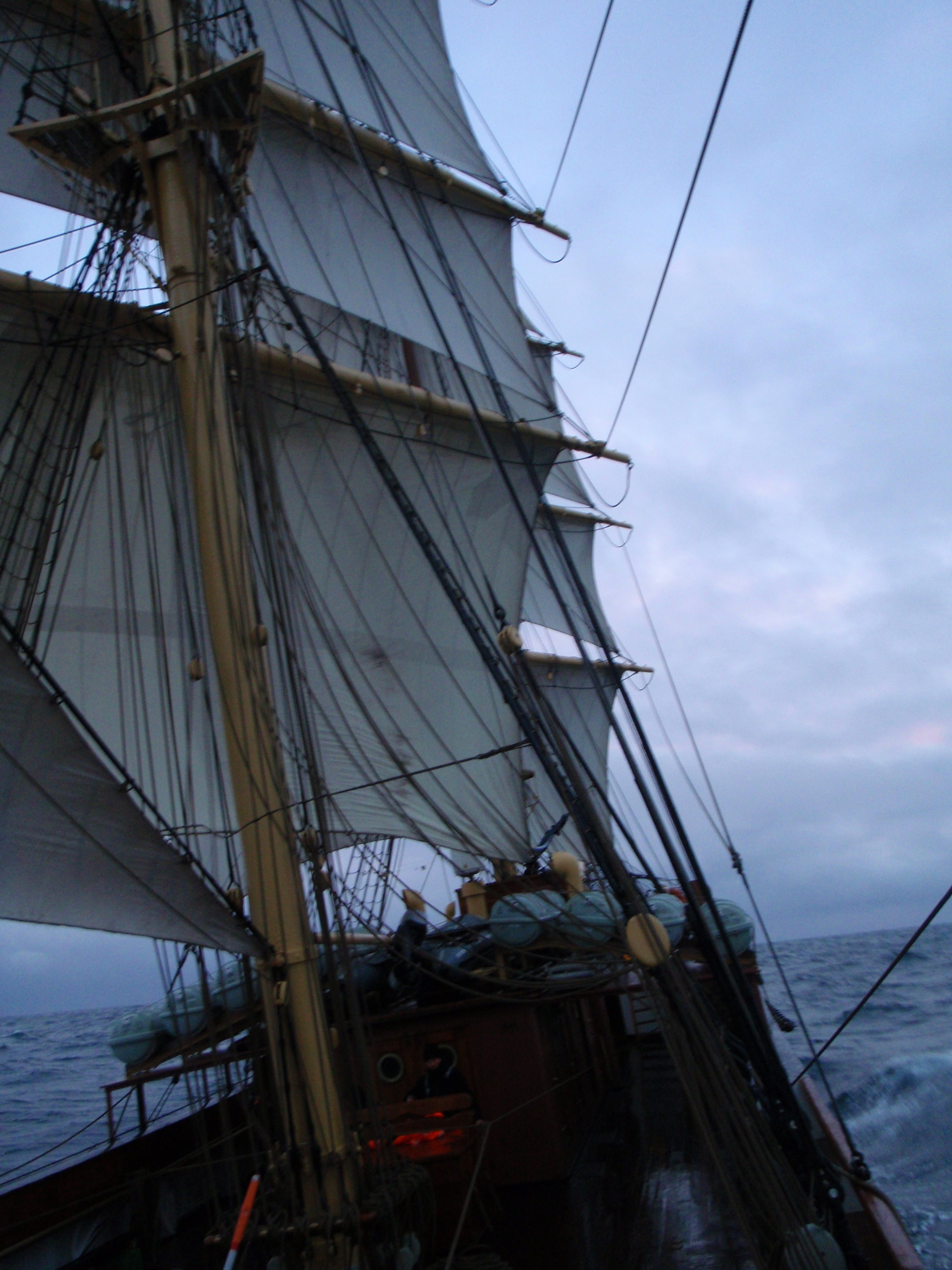 Skoleskibet Georg Stage for fulde sejl